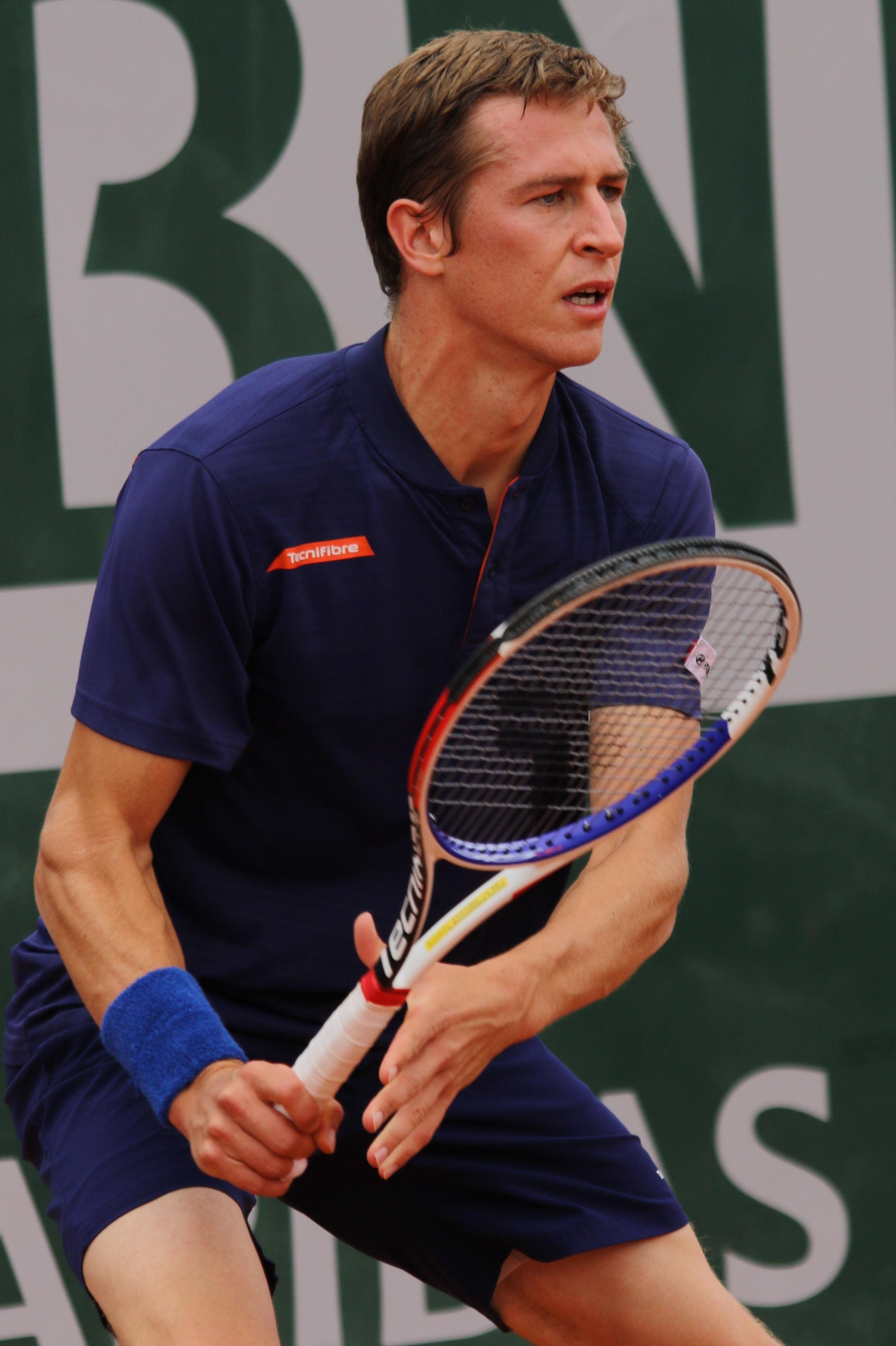 Coppejans RGQ19 (27)